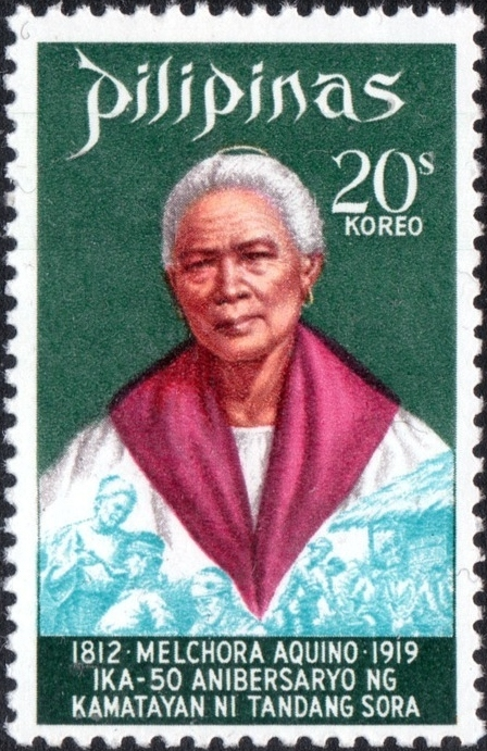 Melchora Aquino